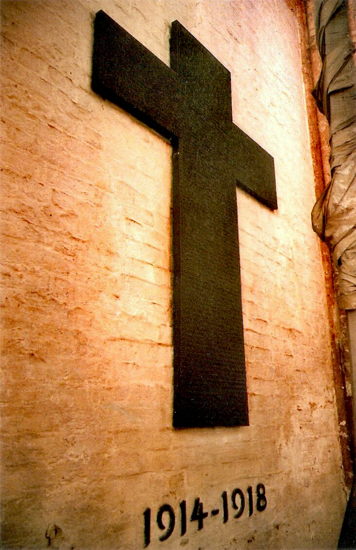 Die in Kreuzform aufgelisteten 318 Kriegsopfer der St. Mariengemeinde zu Lübeck nach einem Entwurf Hans Schwegerles